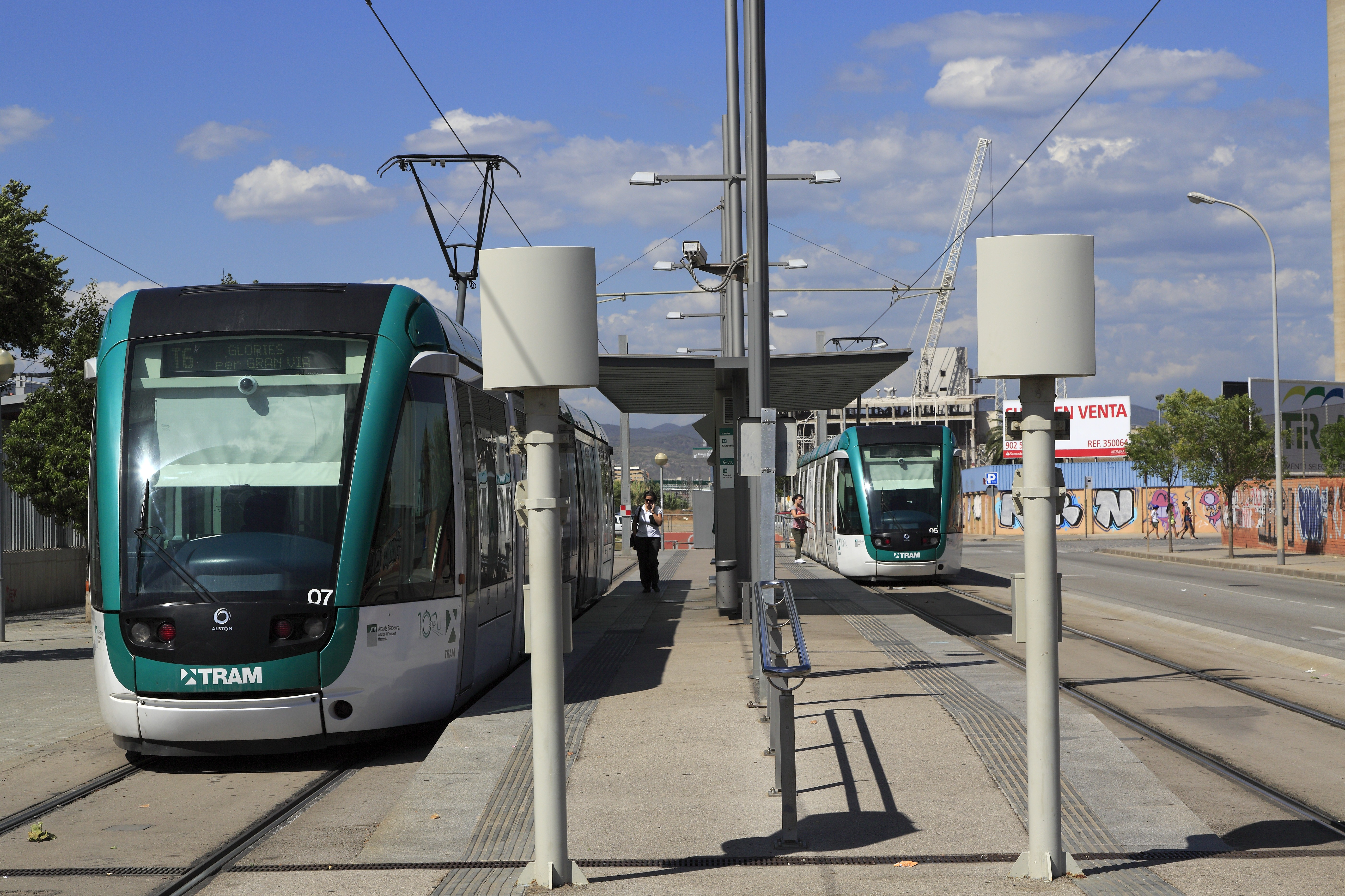 Streckenende an einem Inselbahnsteig. Ein Weiterbau ist zumindest unwahrscheinlich.